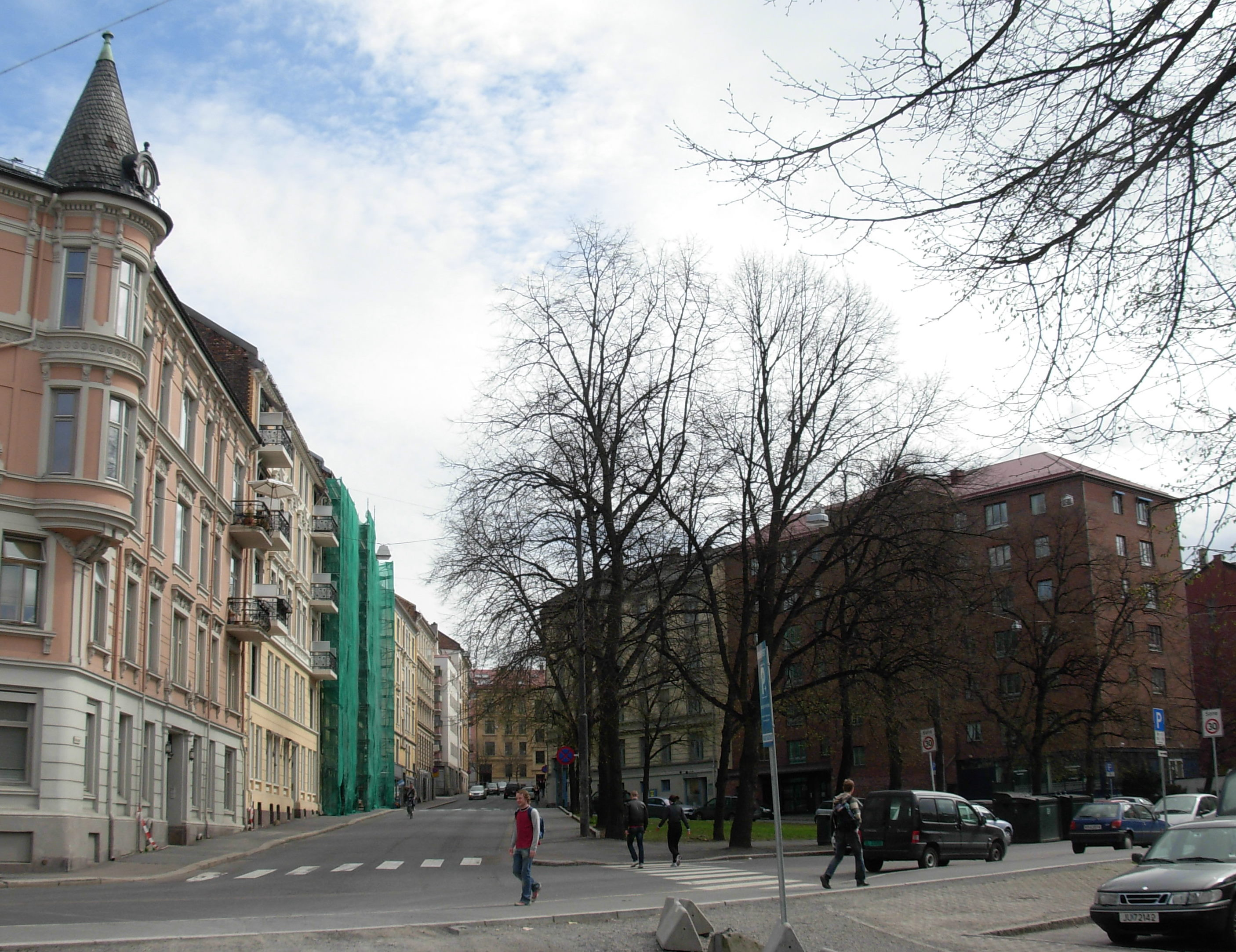 Sofies plass, Bislett, Oslo